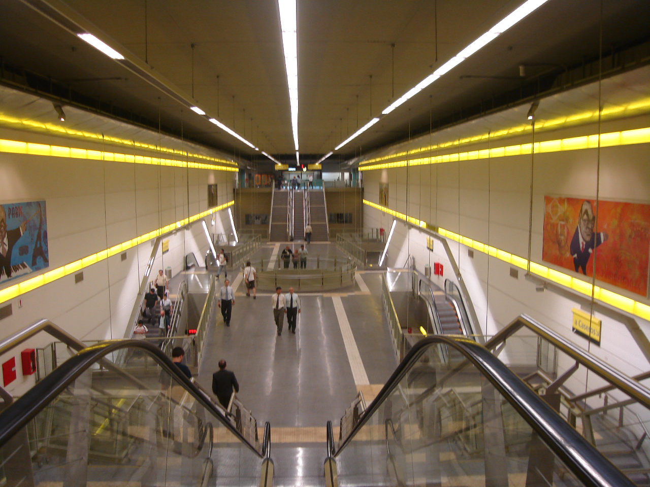 Vista de la estación Humberto Primo de la línea H de la red de subterráneos de la Ciudad de Buenos Aires en el día de su inauguración definitiva.